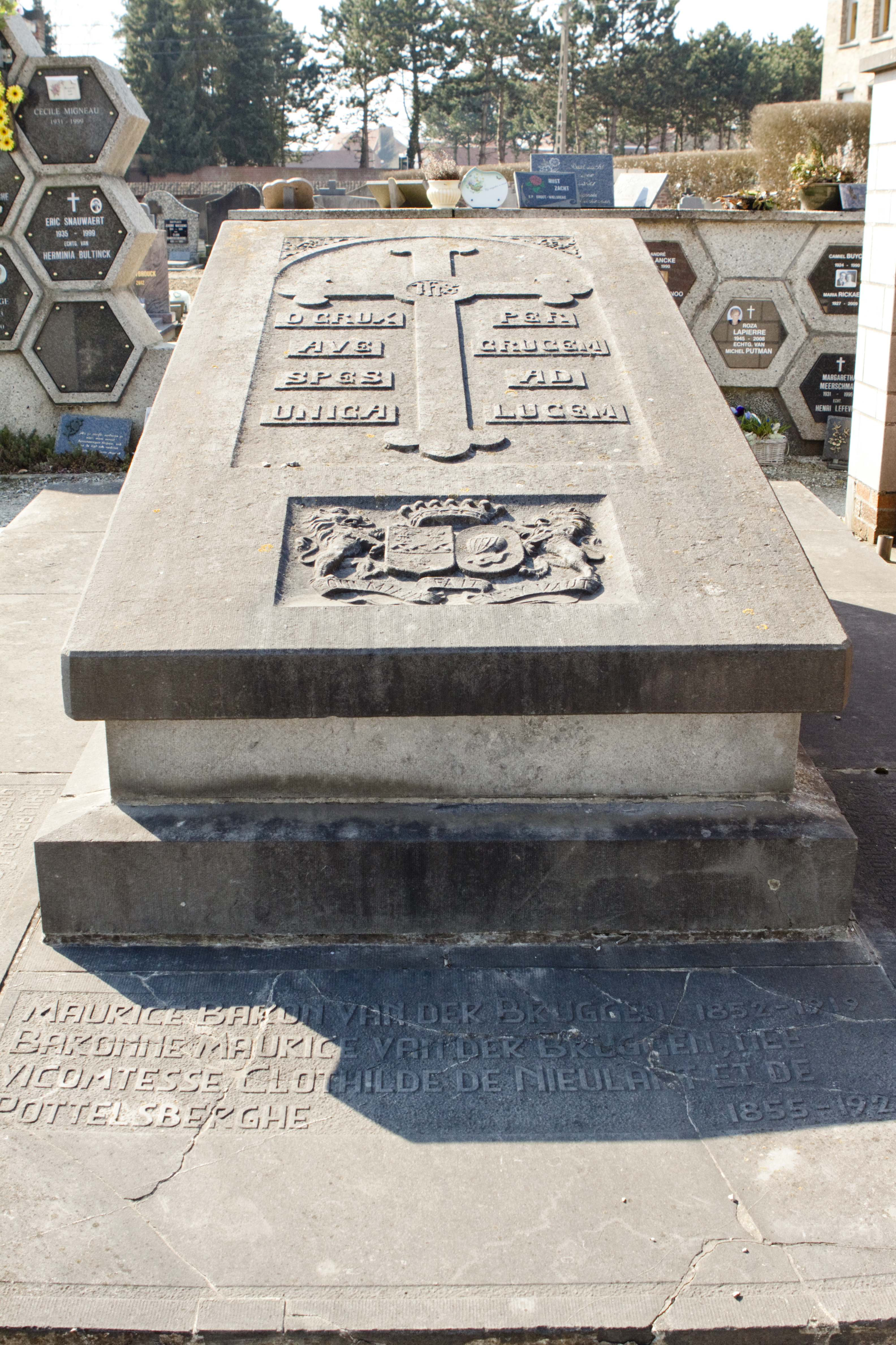 Wielsbeke begraafplaats, Graftombe van baron Maurice vander Bruggen